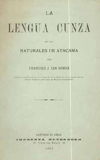 Portada del folleto Lengua Cunza de es: Francisco J. San Román